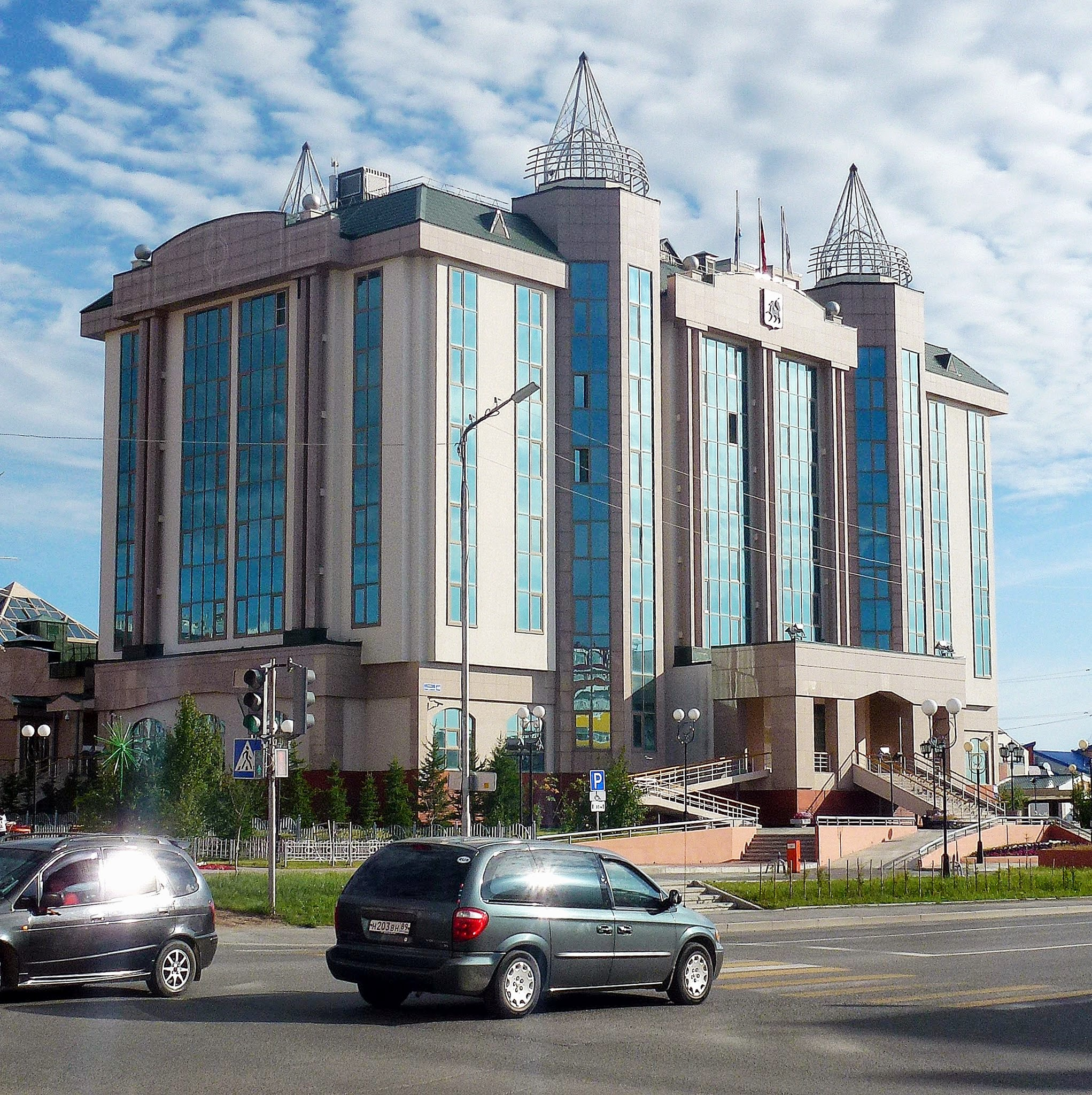 Городская администрация (Салехард)